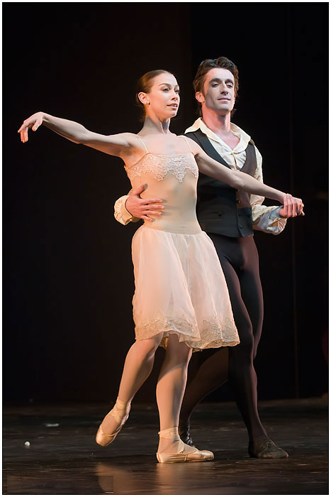 Danza in Fiera Febbraio 2010 Eleonora Abbagnato Benjamin Pech Fotografia di Filippo Tomasi